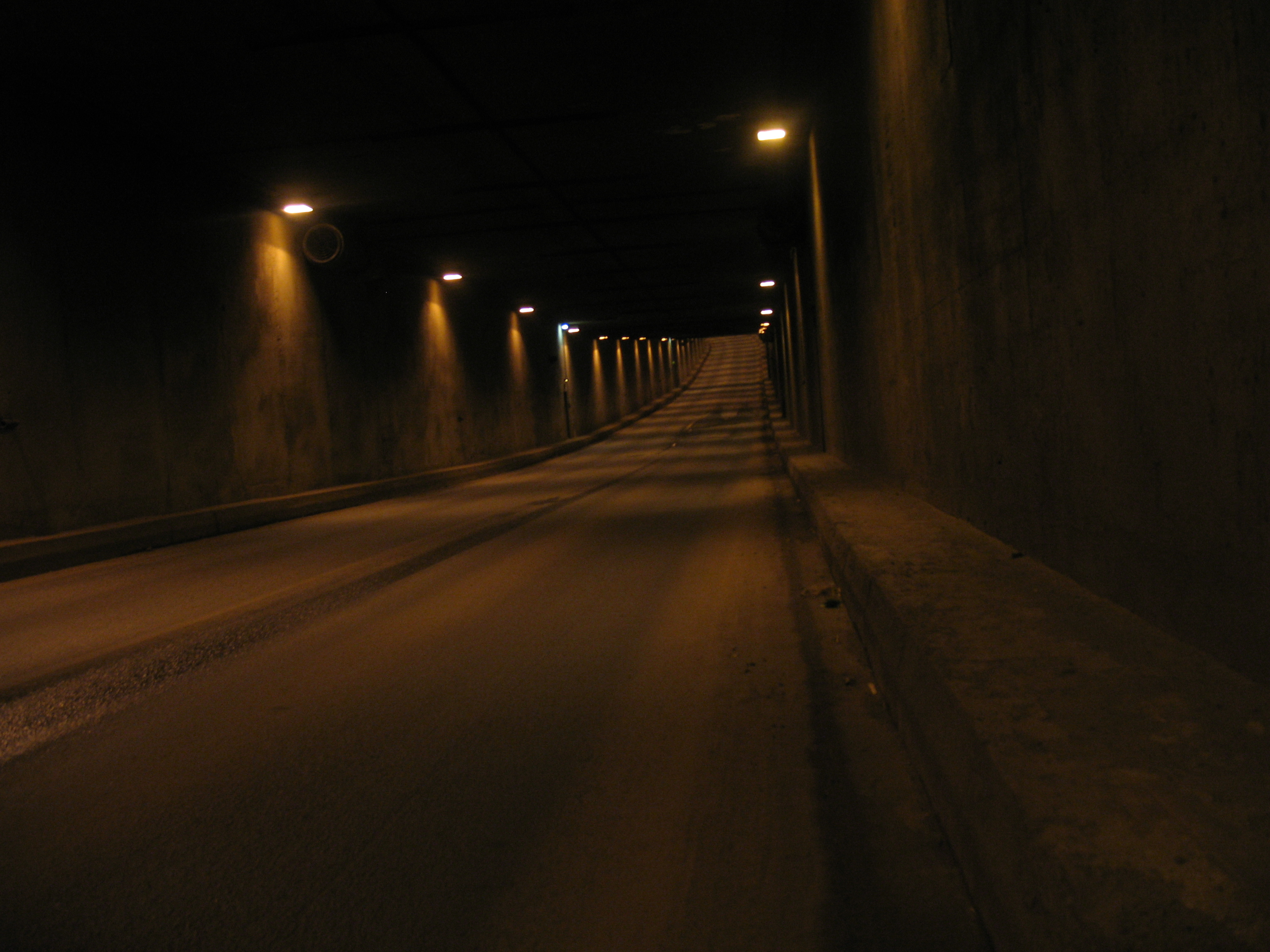 Tunnel between Kanonnersky and Gutuevsky islands, Saint-Petersburg, Russia.